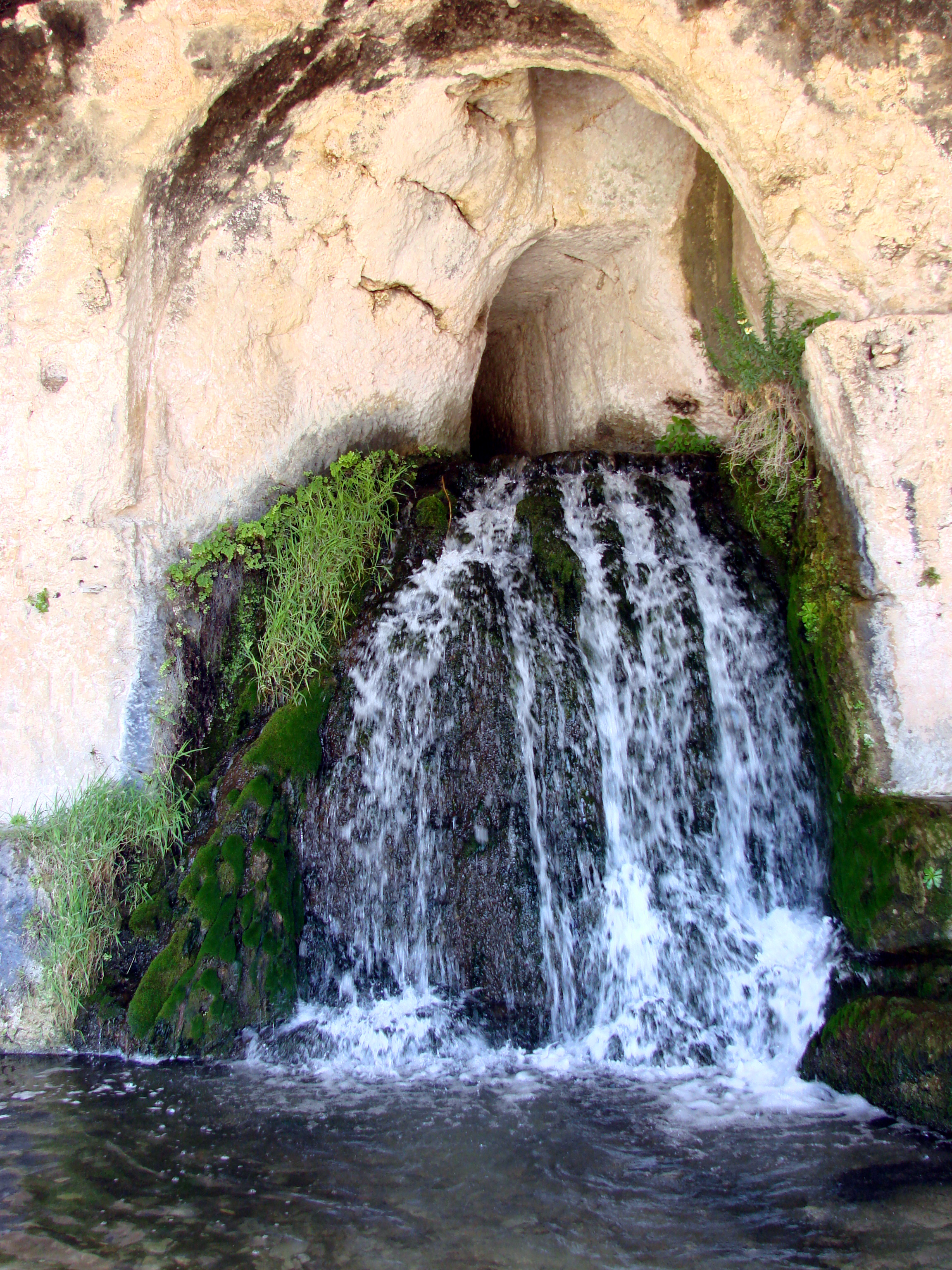 Grotta del Ninfeo - Siracusa - Parco della Neapolis